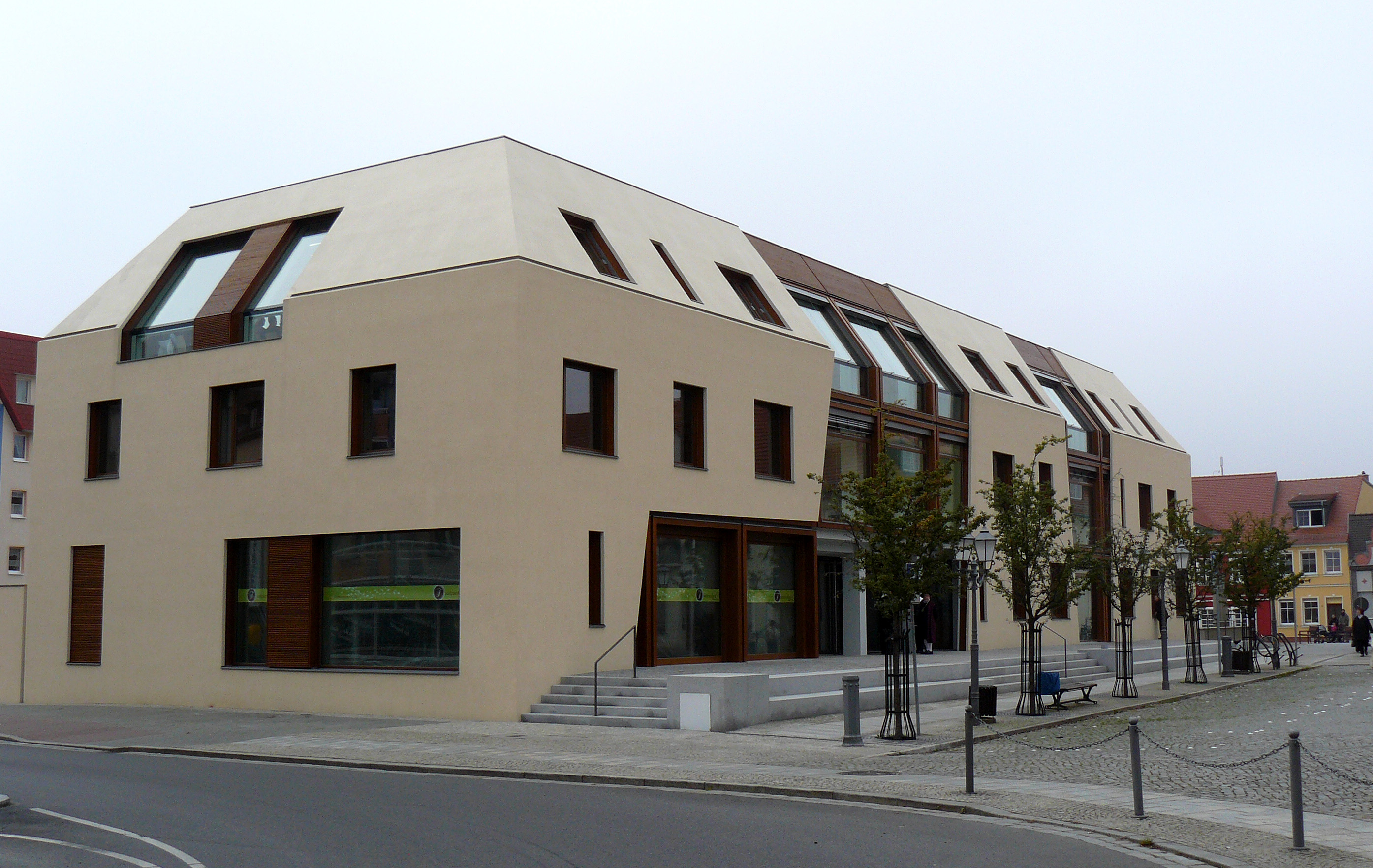 Bürgerhaus in Spremberg am 27.09.2008 dem Tag der offiziellen Einweihung.